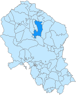 Mapa de Pozoblanco en la provincia de Córdoba, Andalucía, España.